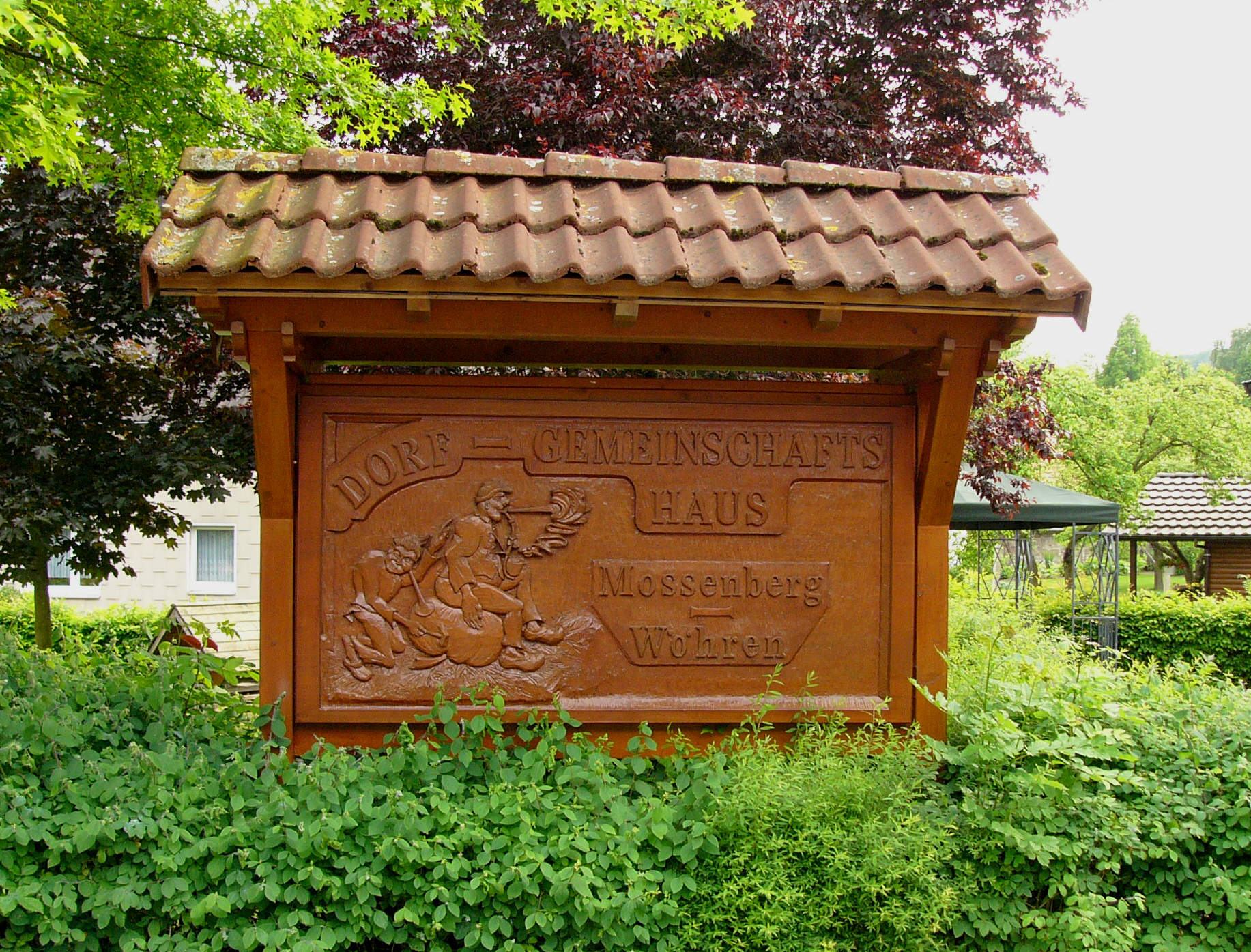 Tafel am Dorfgemeinschaftshaus in Mossenberg-Wöhren, Ortsteil von Blomberg, Germany